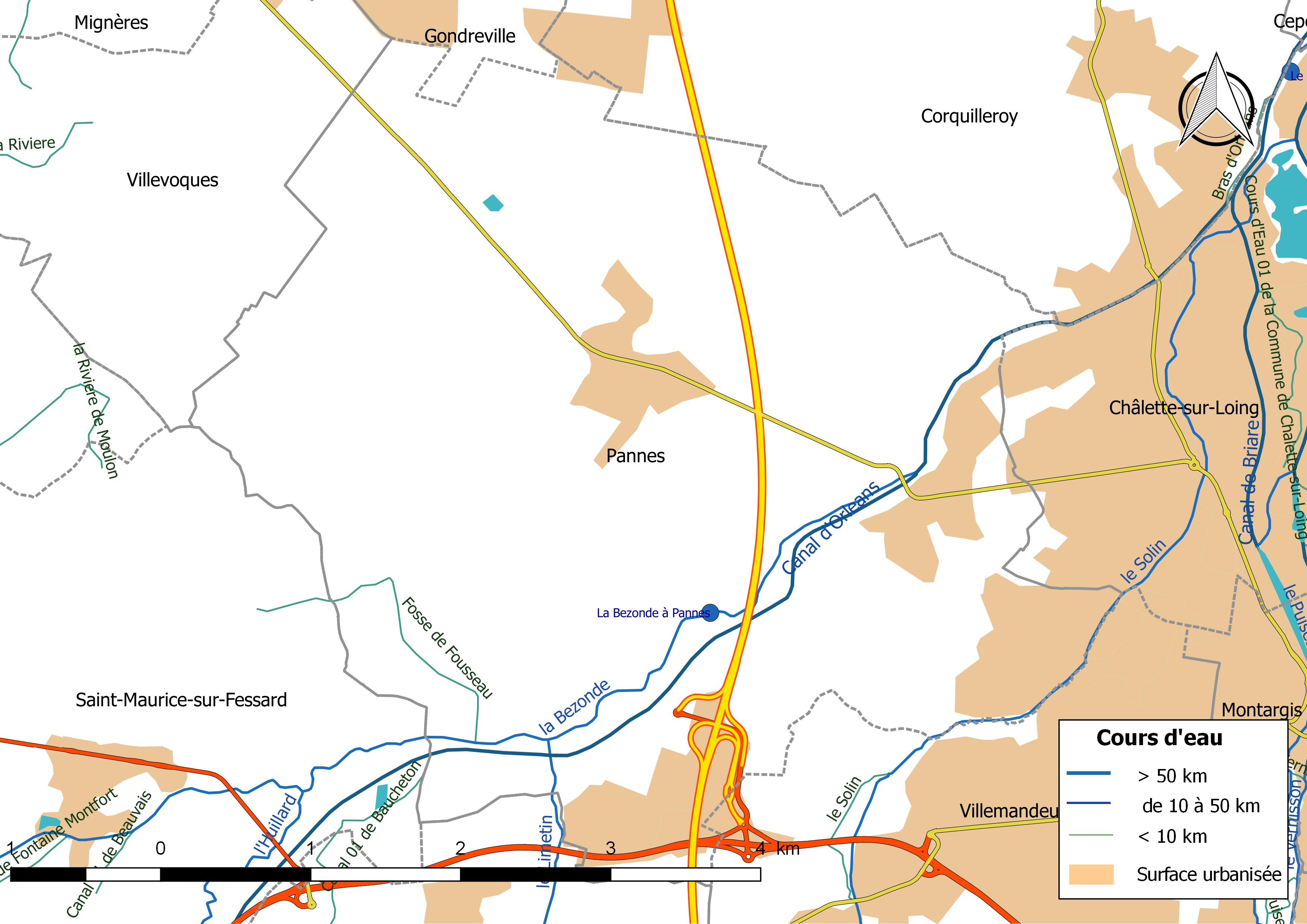 Carte du réseau hydrographique de la commune de Pannes (Loiret) (France).